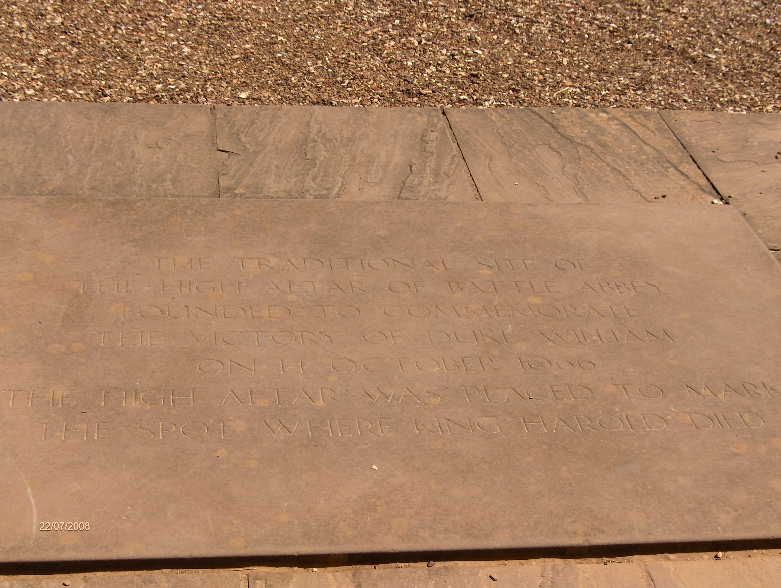 Inschrift der Gedenkplatte an der ehemaligen Stelle des High Altar der Battle Abbey